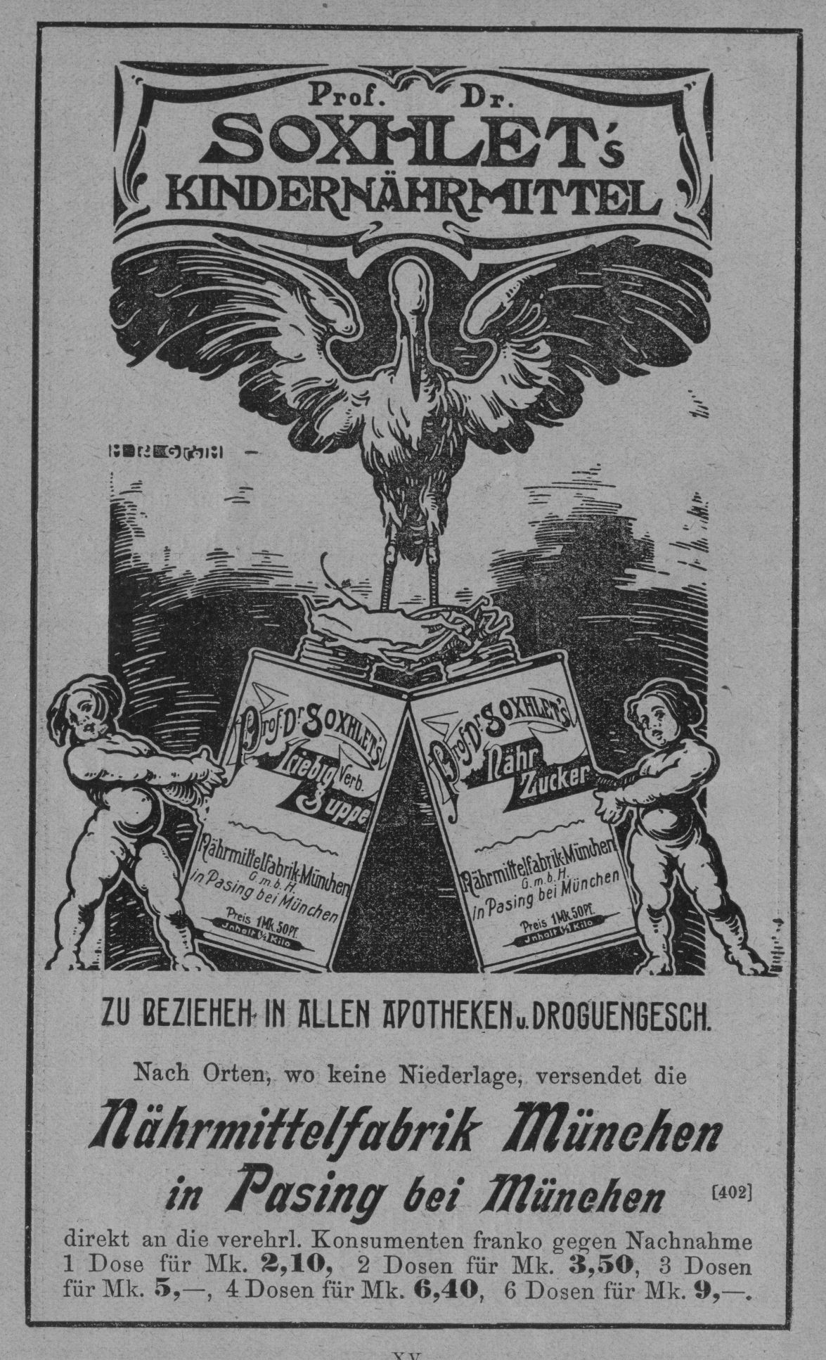 Werbung für Soxhlet's Kindernährmittel in Trowitzsch's Volkskalender 1904. LXXVII. Jahrgang. Seite XV. Trowitzsch & Sohn Berlin, Wilhelm-Straße 29. 1903. Text: Prof. Dr. SOXHLET's KINDERNÄHRMITTEL H Ph Groth ZU BEZIEHEN IN ALLEN APOTHEKEN u. DROGUENGESCH. Nach Orten, wo keine Niederlage, versendet die Nährmittelfabrik München in Pasing bei München [402] direkt an die verehrl. Konsumenten franko gegen Nachnahme 1 Dose für Mk. 2,10, 2 Dosen für Mk. 3,50, 3 Dosen für Mk. 5,-, 4 Dosen für Mk. 6,40, 6 Dosen für Mk. 9,-.